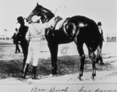 Ben Brush (d. 1918)